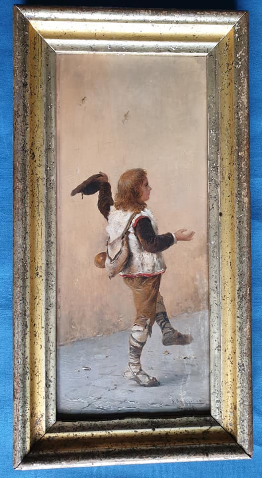 il maschietto